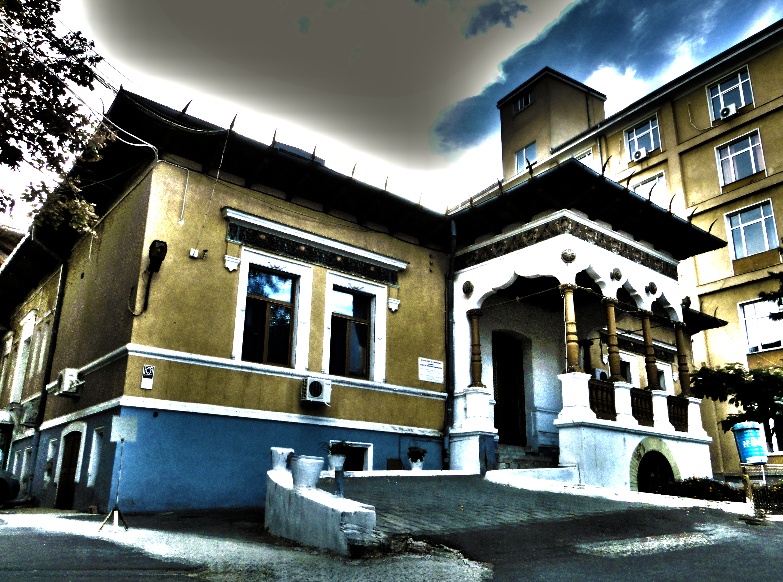 Casa G-ral Lahovary, azi corp al Spitalului Cantacuzino